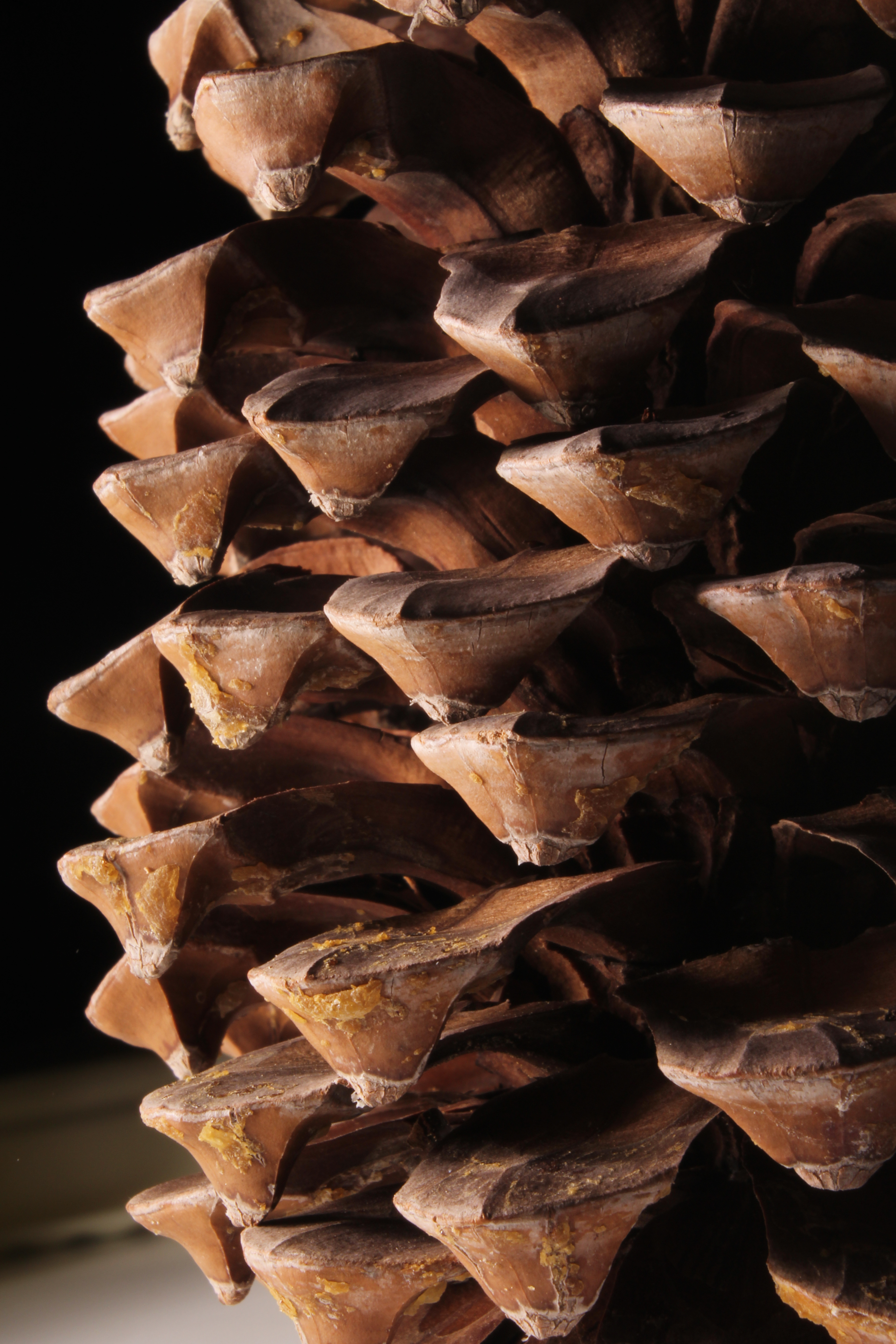 .אצטרובל אשר צולם לאורך. ניתן להבחין בצבעיו המיוחדים